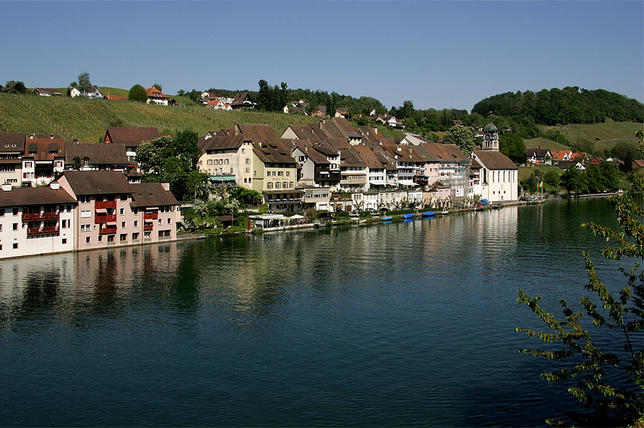 Stadt Eglisau